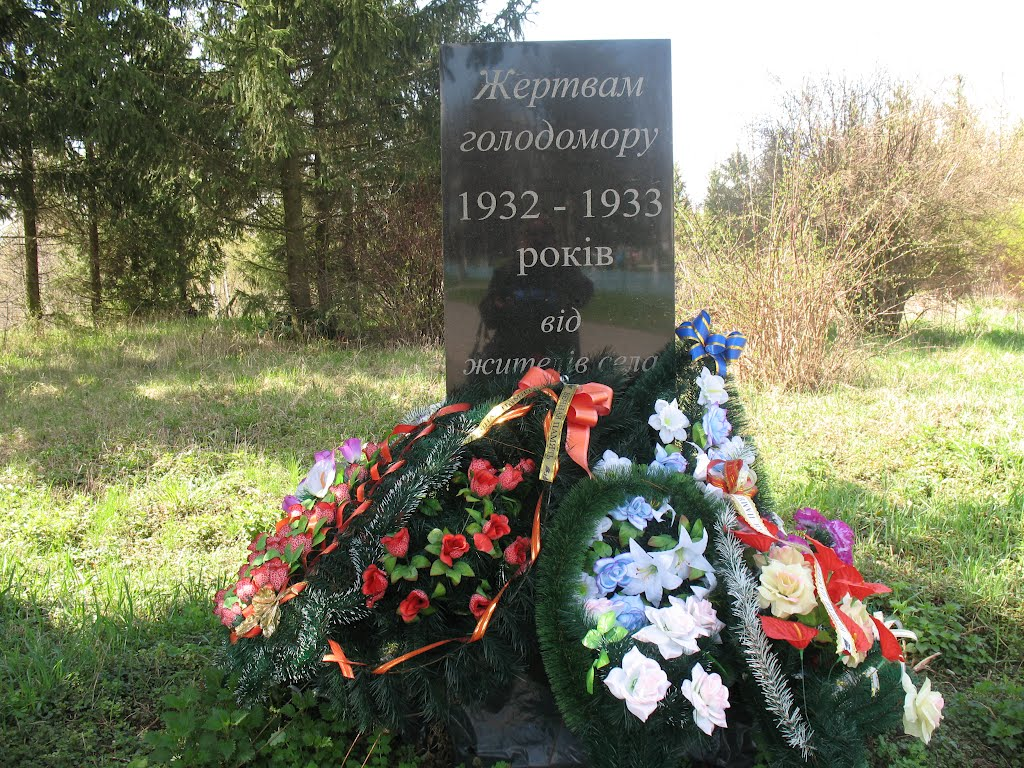 Севастянівка голодомор 1933